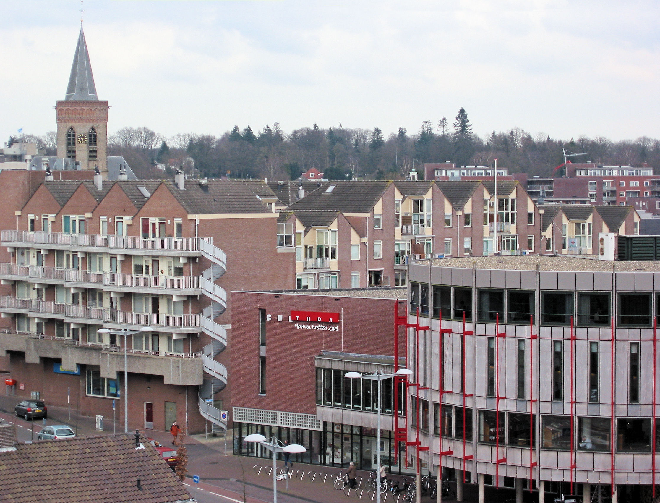 Ede gezien vanaf Concordiamolen